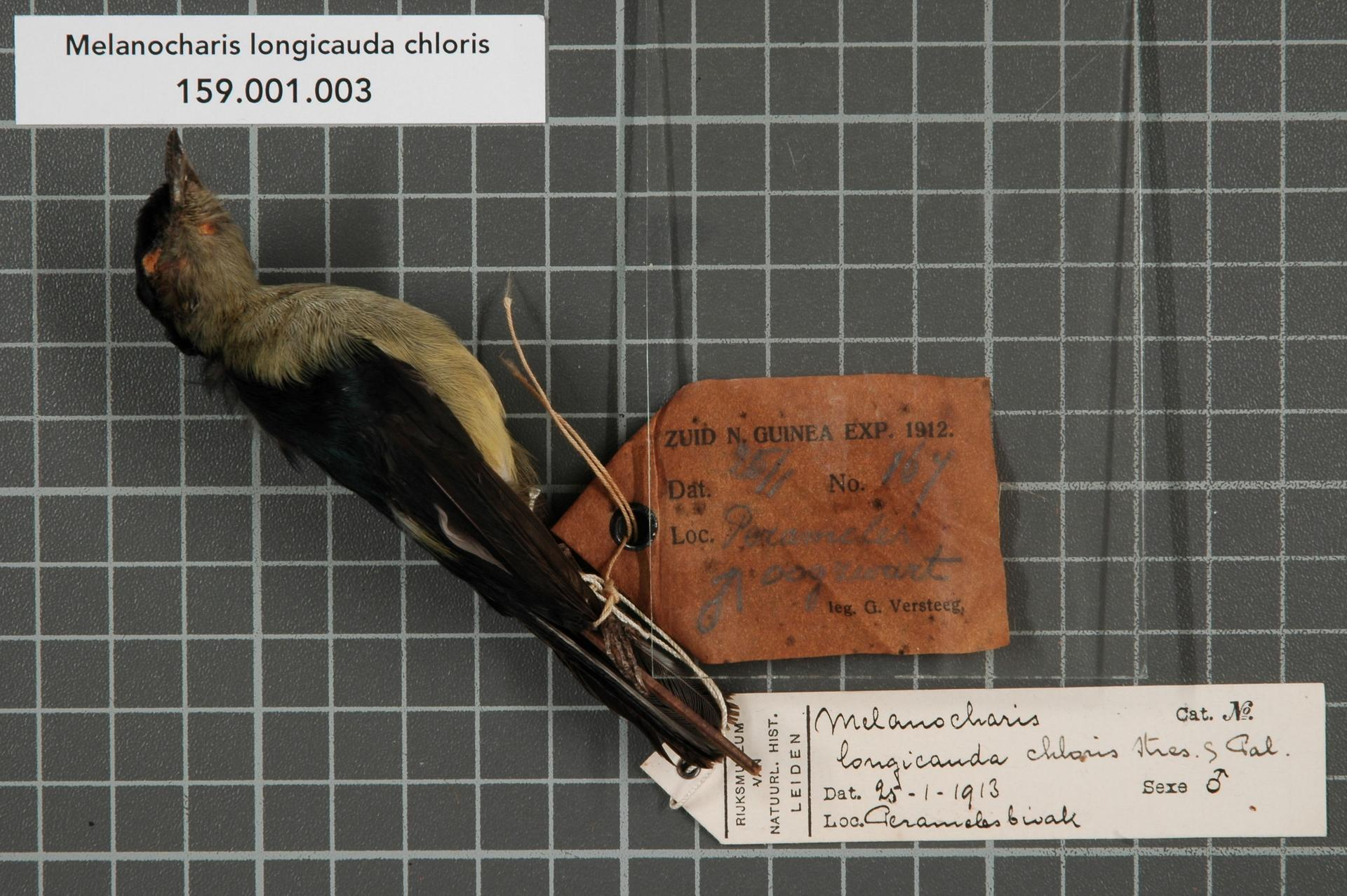 Melanocharis longicauda chloris Stresemann & Paludan, 1934